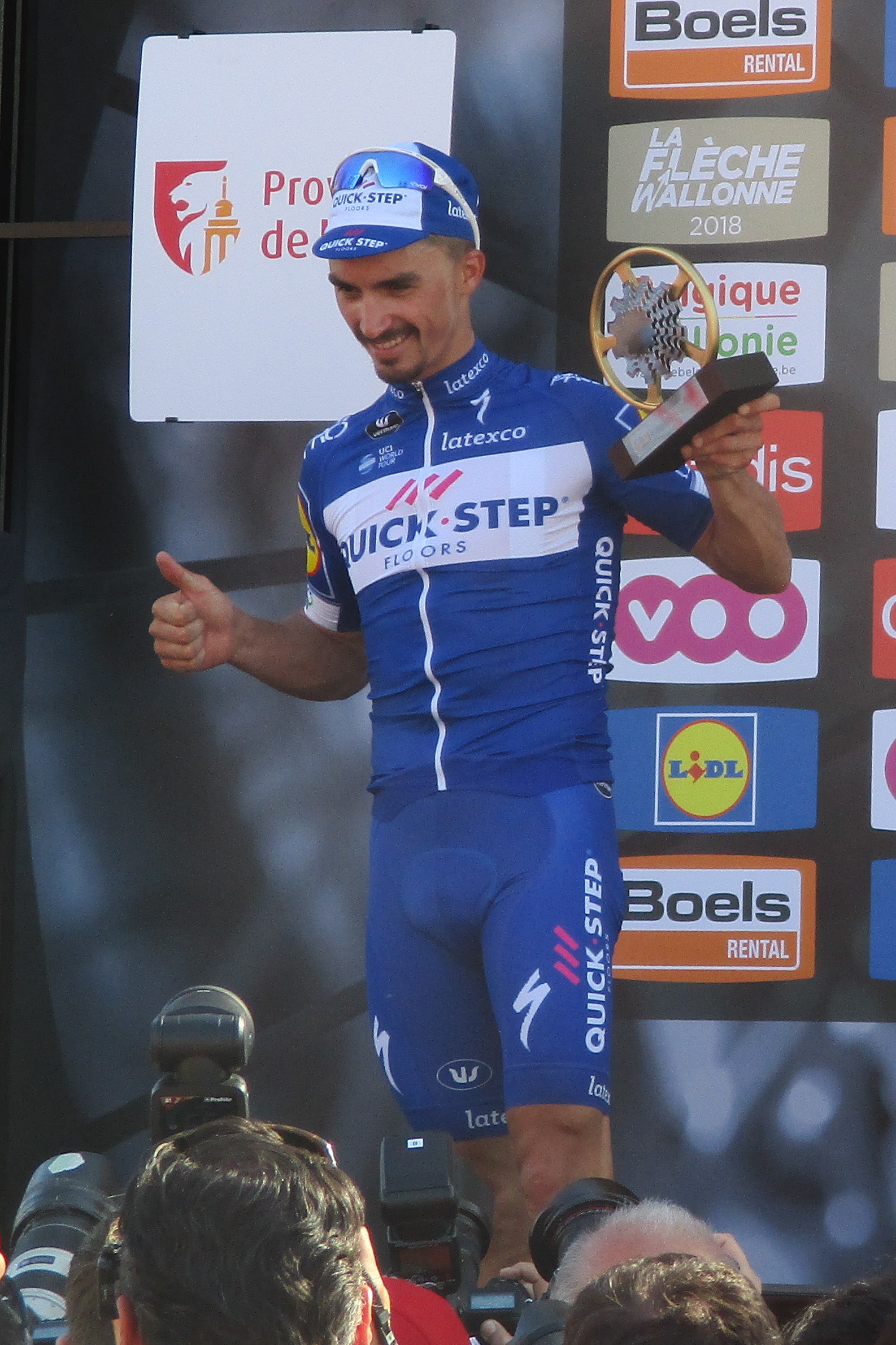 Waalse Pijl 2018 op de Mur van Huy. 1. Julian Alaphilippe; 2. Alejandro Valverde; 3. Jelle Vanendert